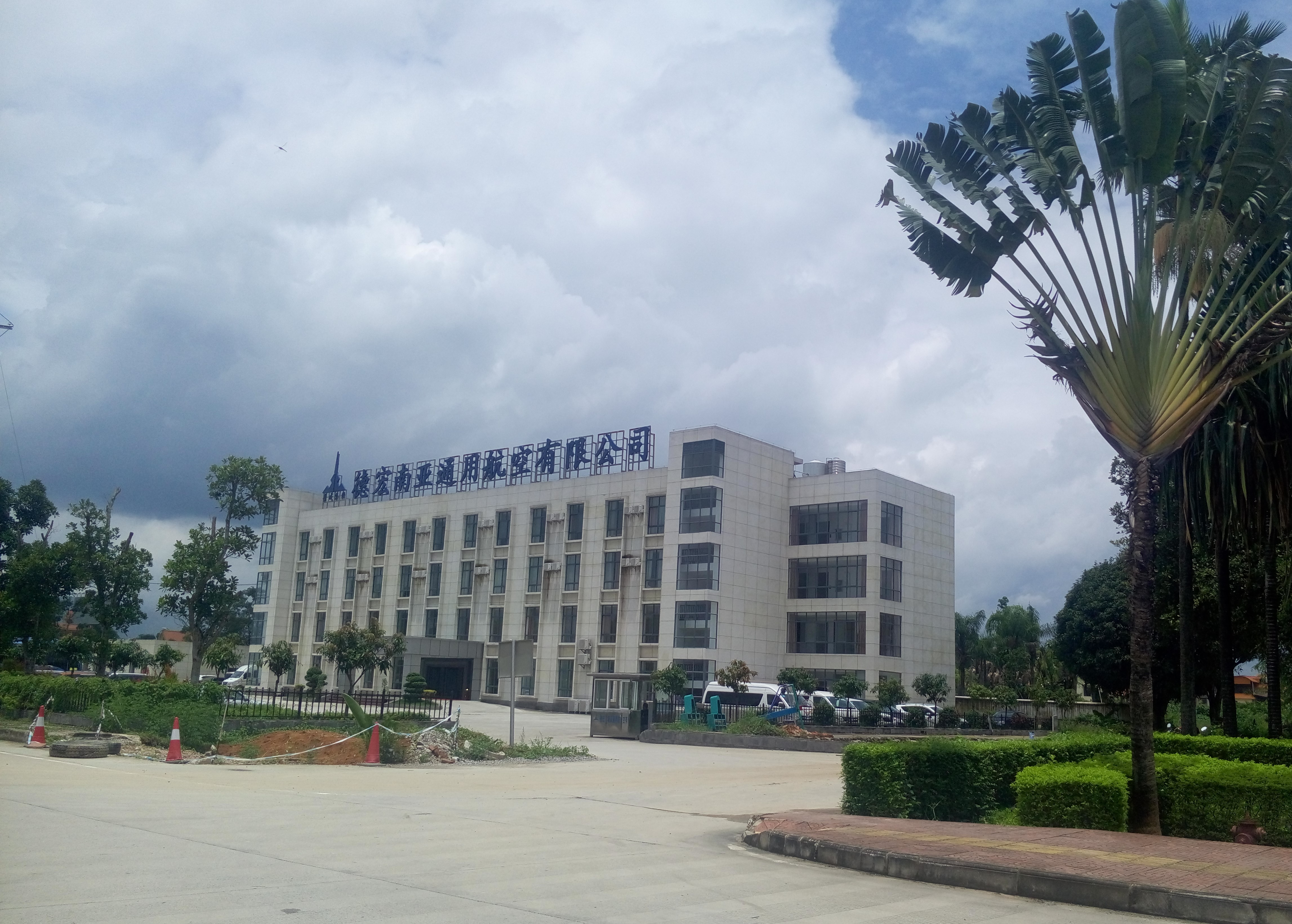 中文（中国大陆）: 德宏南亚通用航空有限公司位于芒市机场的办公楼